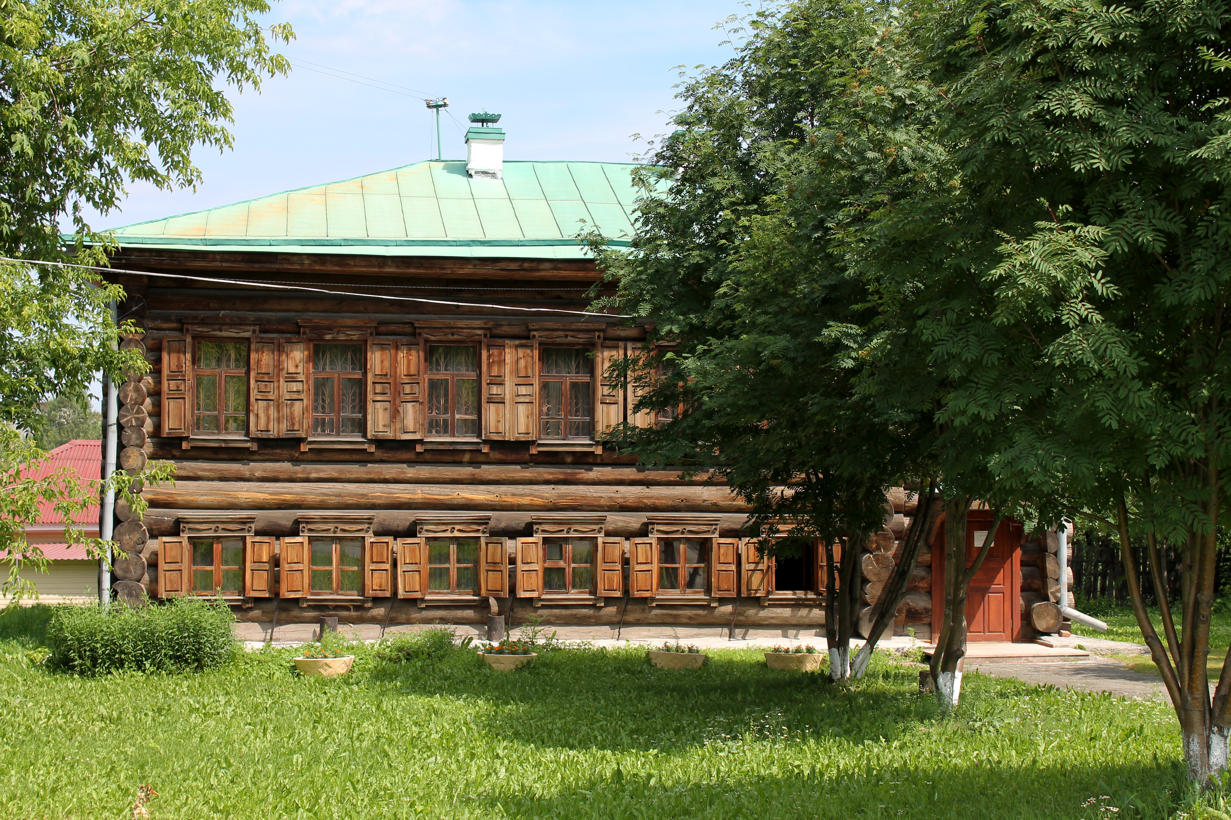 Нижний Тагил, улица Тагильская, 24